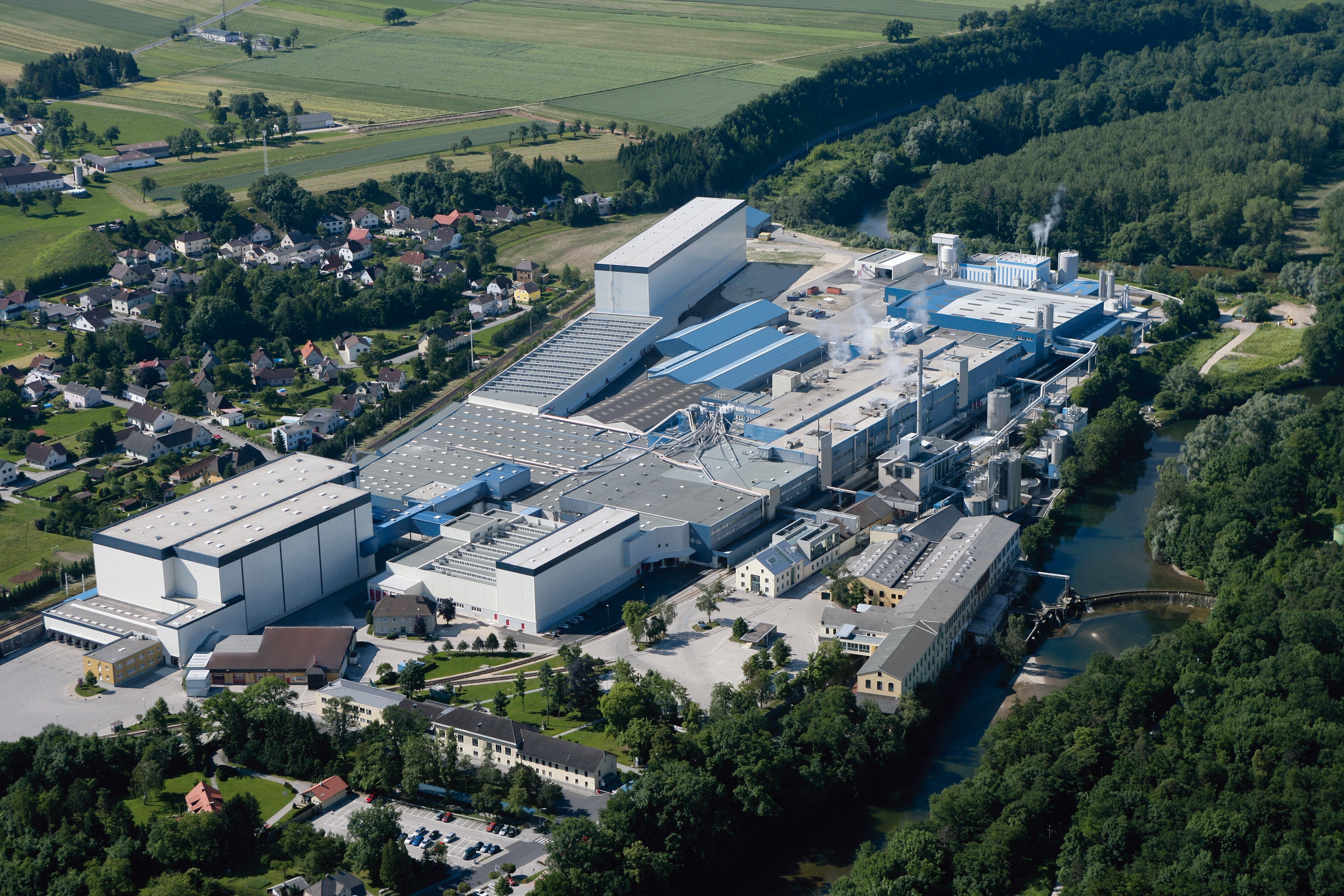 Ansicht der Firma Mondi Neusiedler (Werk Theresienthal)